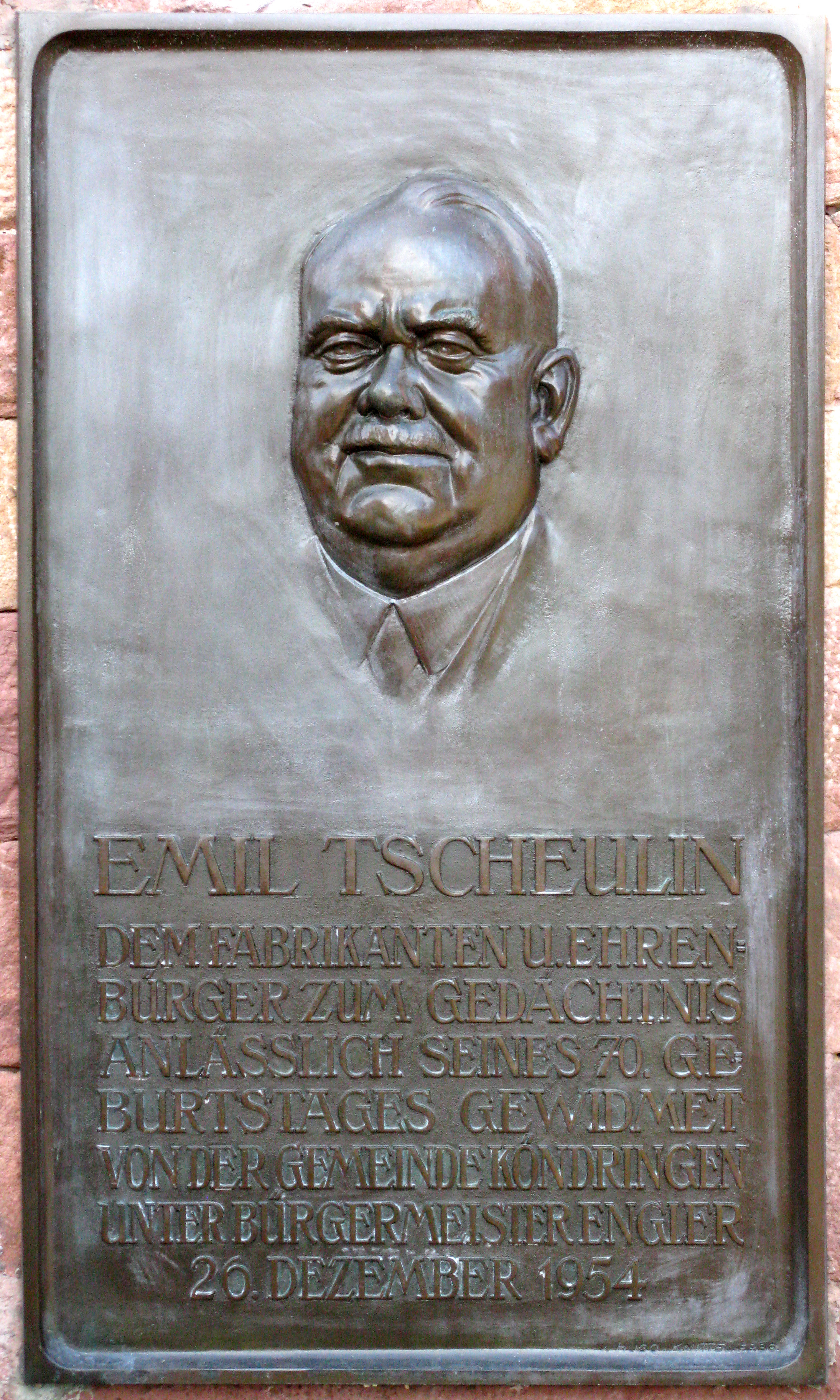 Gedenktafel für Emil Tscheulin an der ev. Stadtkirche von Köndringen